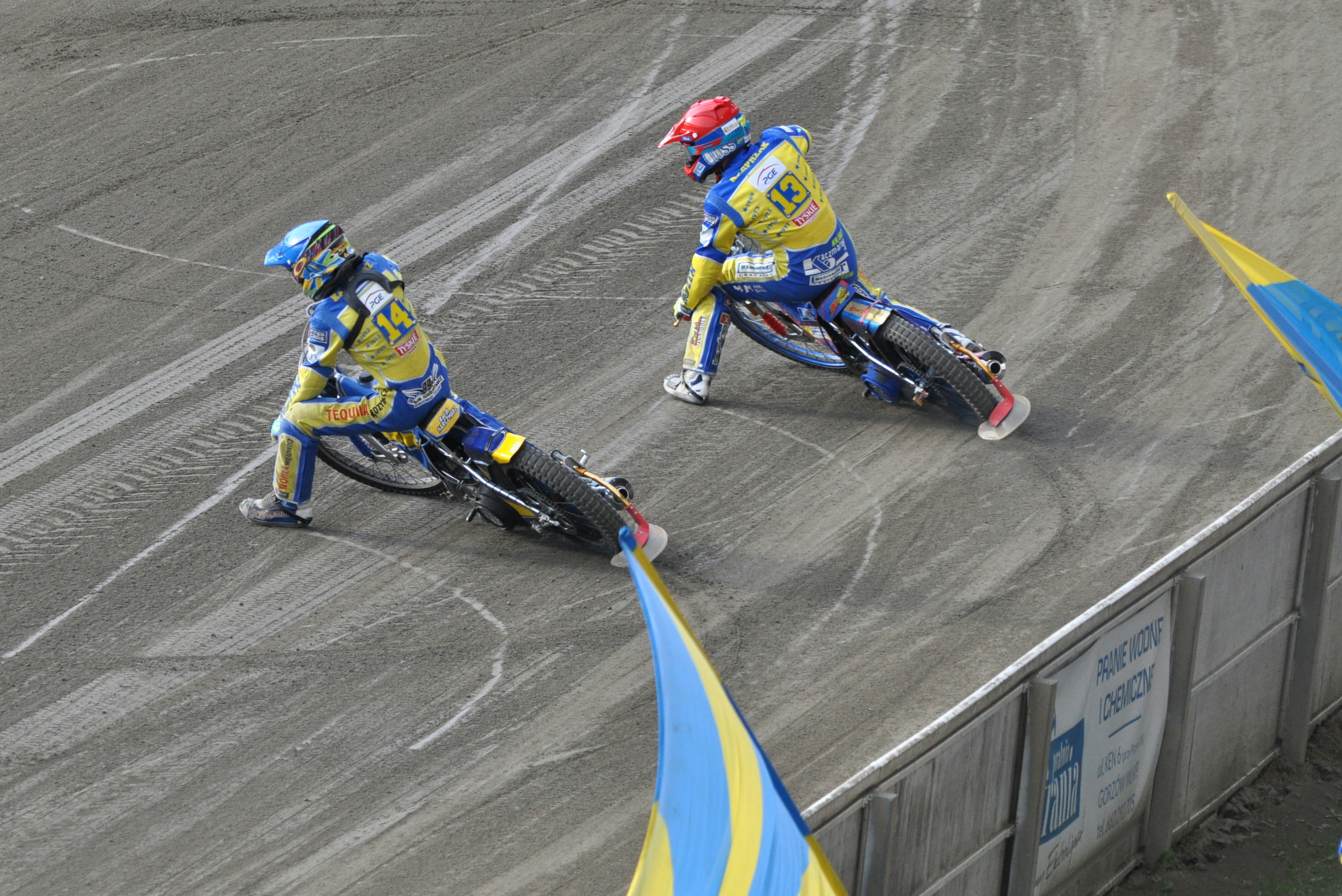 Gorzów Wlkp. - 17.09.2017 r. Derby Ziemi Lubuskiej nr 93. Po 6 biegu zwycięzcy zawodnicy Stali Gorzów kierują się do parku maszyn. 3 pkt zdobył K.Kasprzak (Cz), 2 pkt - R.Karczmarz (N), 1 pkt - P.Protasiewicz i bez punktu - P.Dudek, którego motocykl zdefektował.